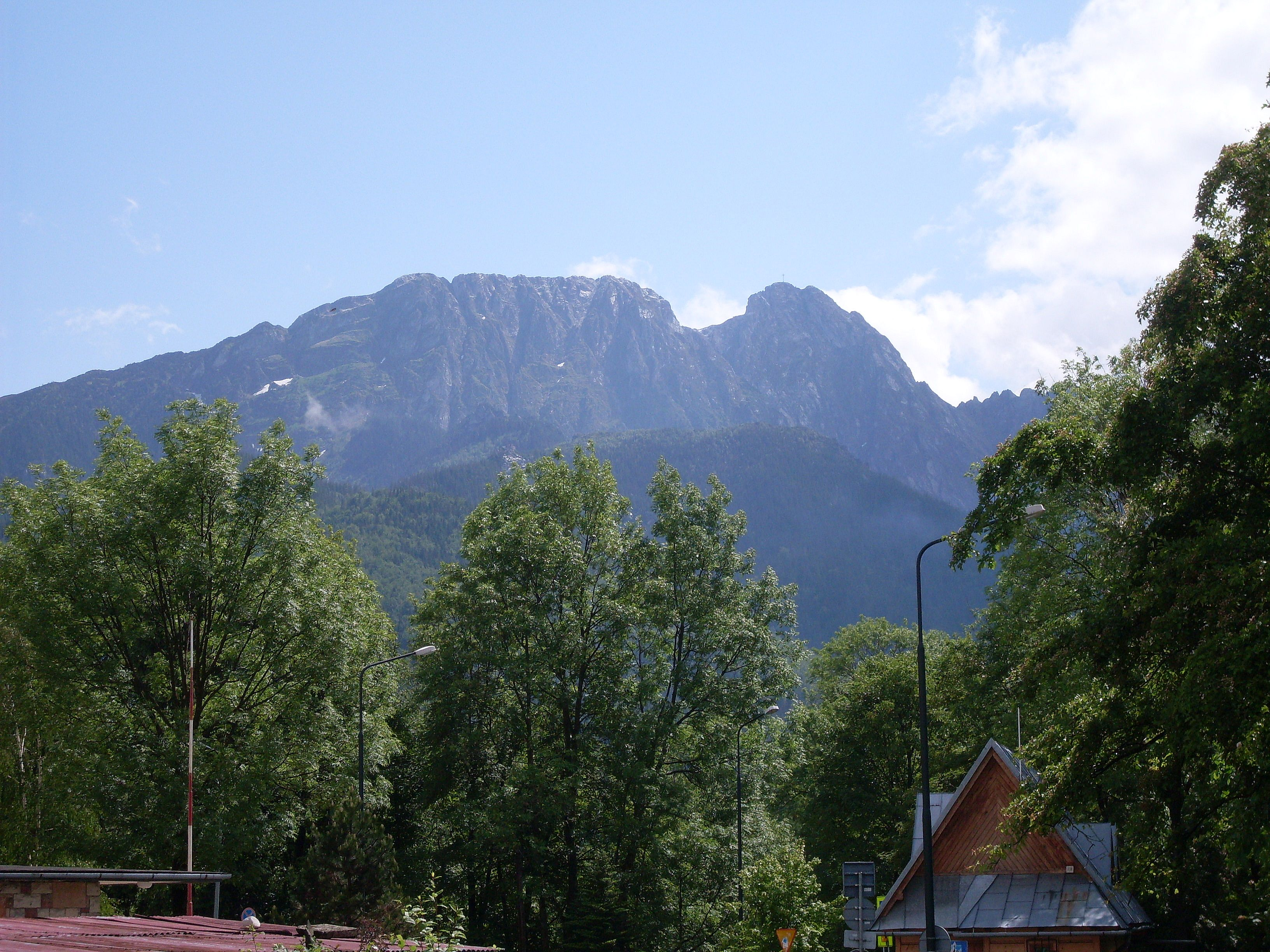 Widok na Giewont z Zakopanego